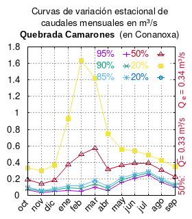 Curvas de variación estacional de la quebrada de Camarones en Conanoxa. Comisión Nacional de Riego DIAGNÓSTICO ACTUAL DEL RIEGO Y DRENAJE EN CHILE Y SU PROYECCIÓN INFORME FINAL DIAGNÓSTICO DEL RIEGO Y DRENAJE EN LA I REGIÓN FEBRERO - 2003 Santiago de Chile url: urlarchivo: Anexo Estación 5 (pág. 71 del navegador pdf) mes 95% 90% 85% 50% 20% oct 0.067 0.085 0.100 0.194 0.333 nov 0.034 0.047 0.058 0.144 0.302 dic 0.049 0.065 0.079 0.183 0.362 ene 0.061 0.091 0.119 0.371 0.932 feb 0.049 0.082 0.116 0.499 1.632 mar 0.096 0.142 0.185 0.570 1.418 abr 0.058 0.085 0.109 0.316 0.748 may 0.159 0.191 0.216 0.364 0.555 jun 0.205 0.236 0.260 0.390 0.542 jul 0.248 0.274 0.292 0.387 0.487 ago 0.157 0.181 0.200 0.303 0.424 sep 0.096 0.116 0.131 0.225 0.347